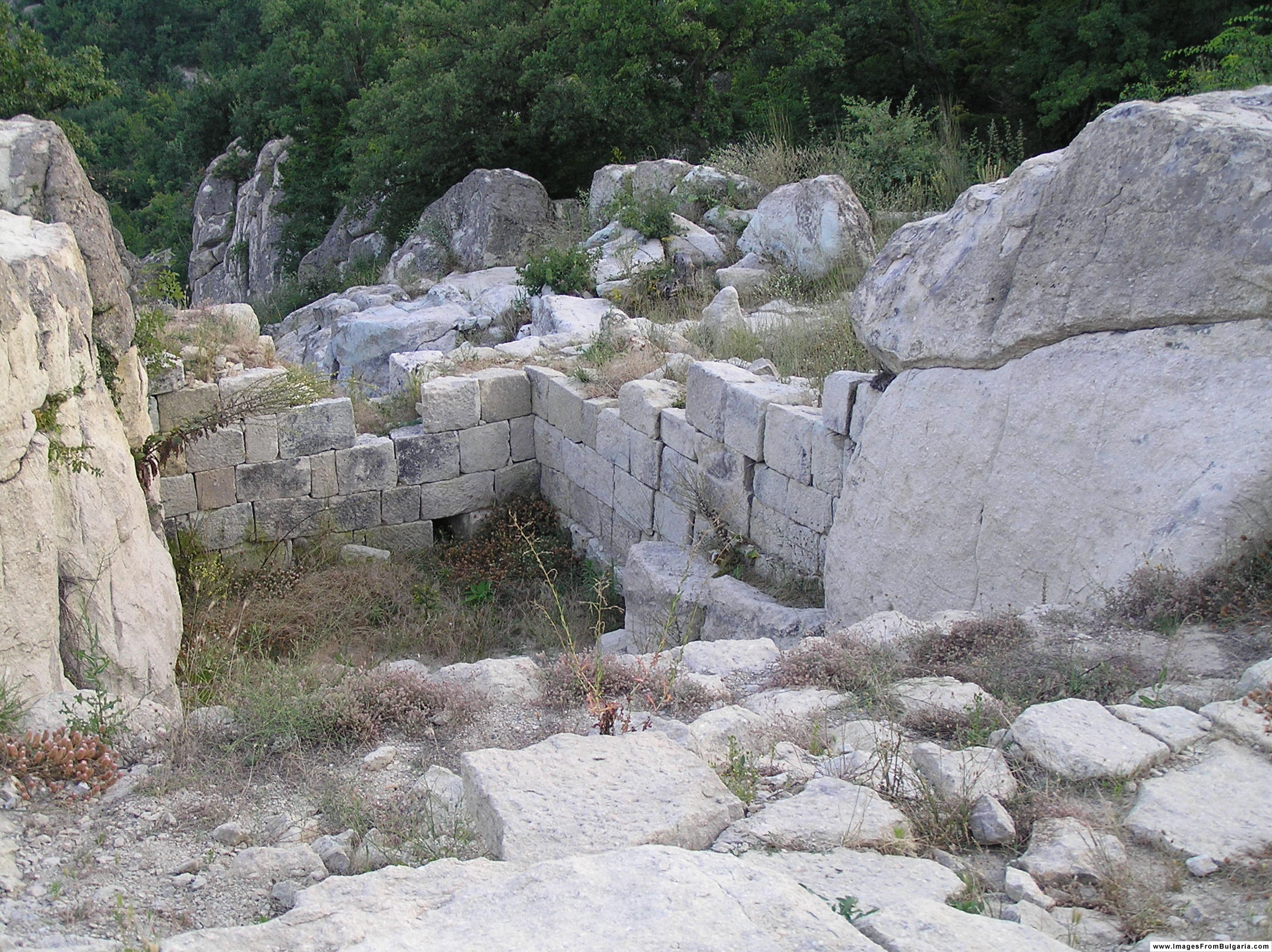 Perperikon, Bulgaria.